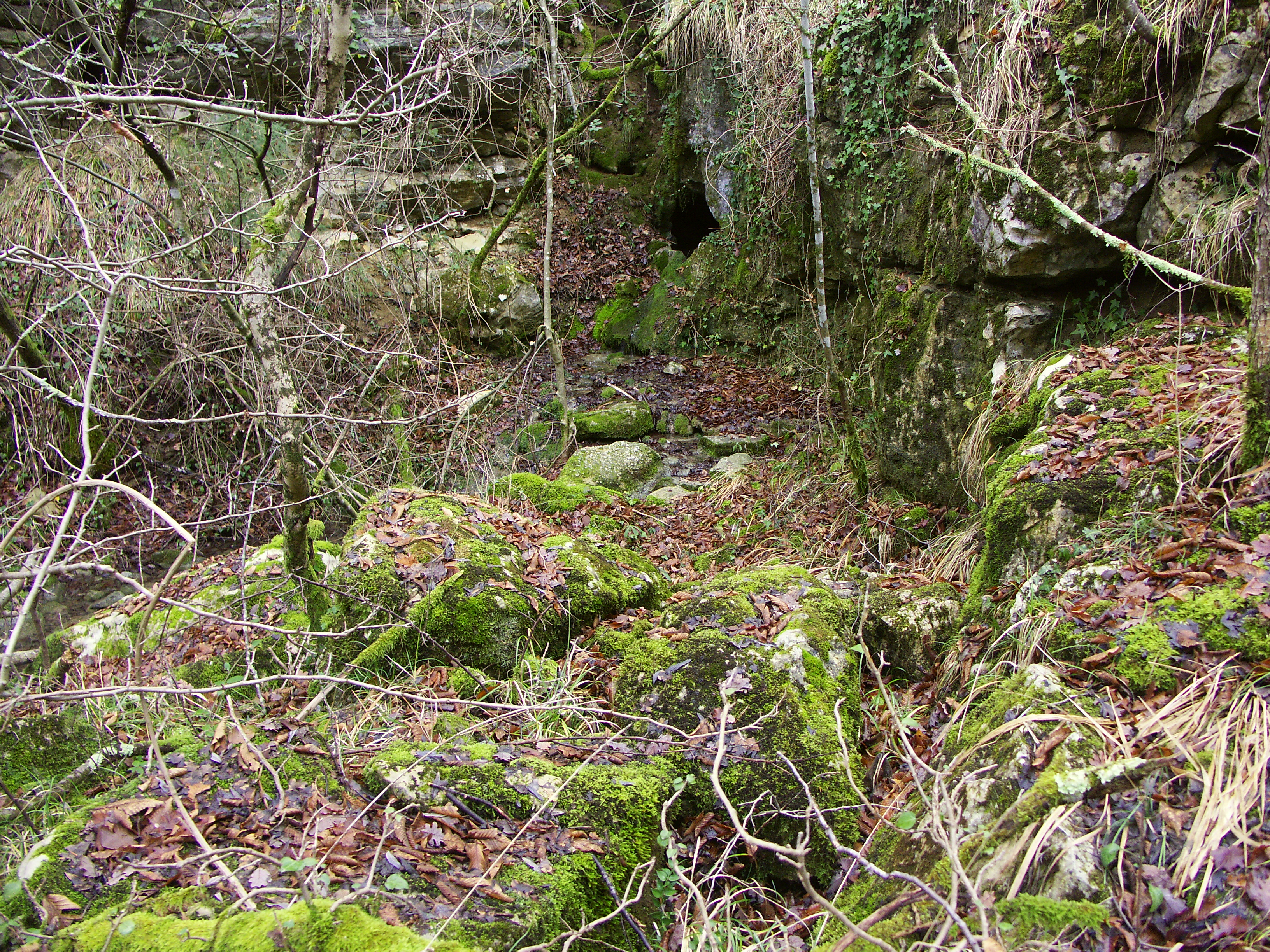 Izvir Črni Zvroček